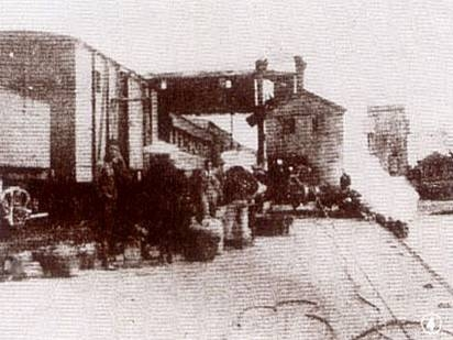 牛湾渡轮上的火车